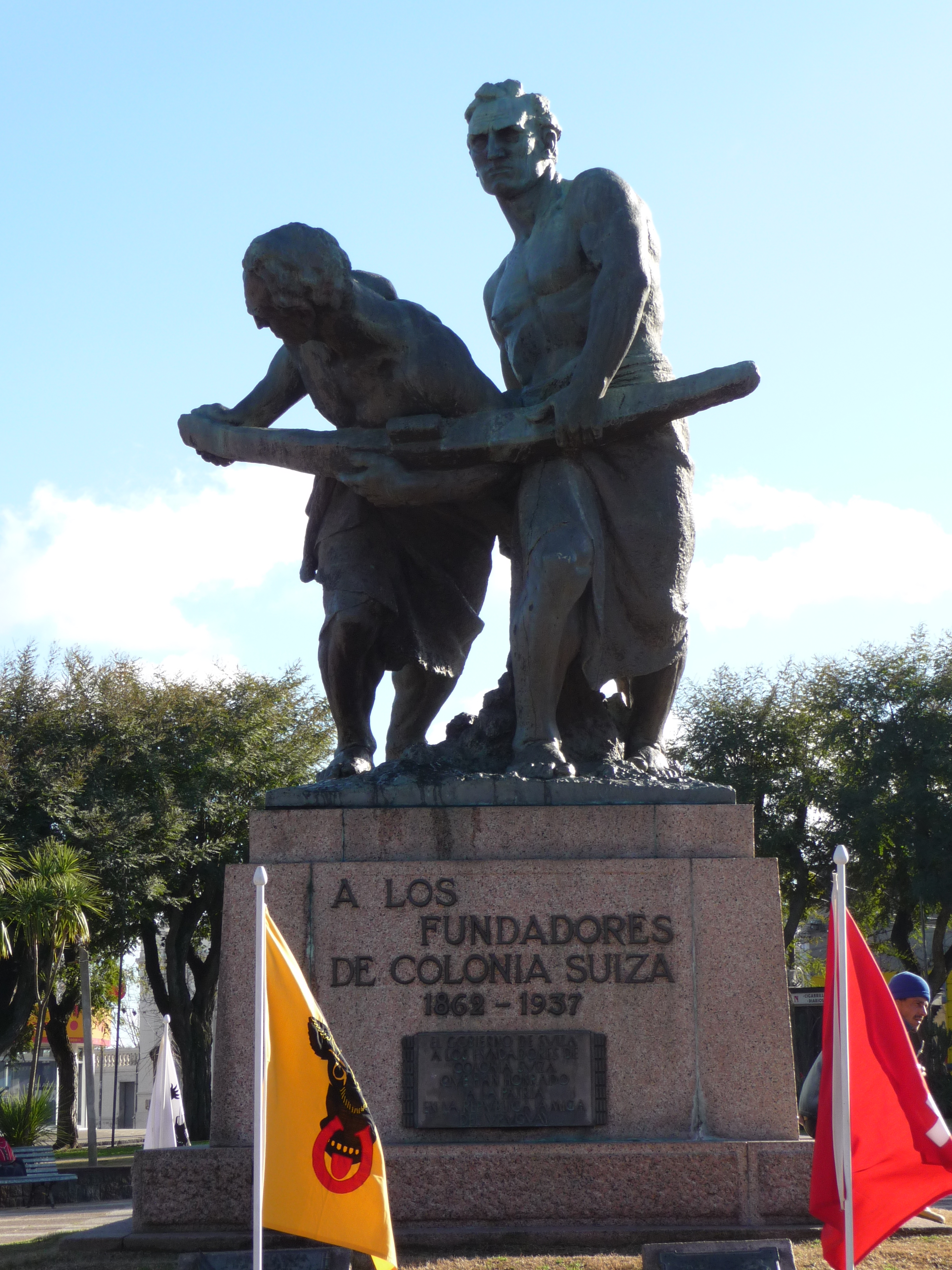 Monumento a los fundadores de Colonia Suiza. Ubicada en el departamento de Colonia